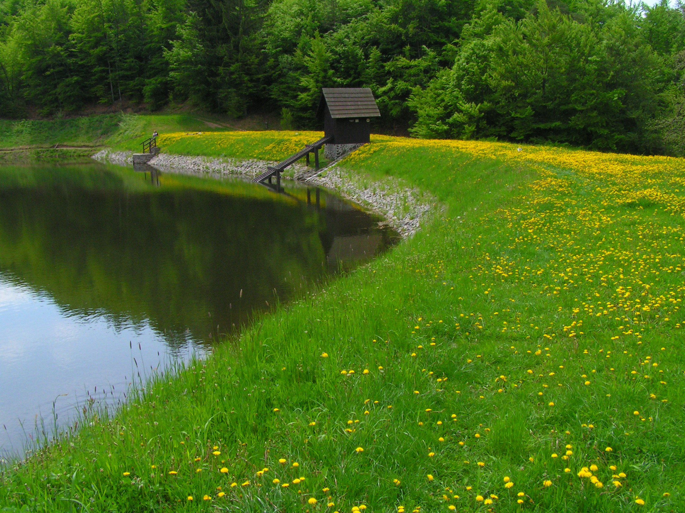 Tajch Moderštôlňa- hrádza s regulačným objektom - Mníchom